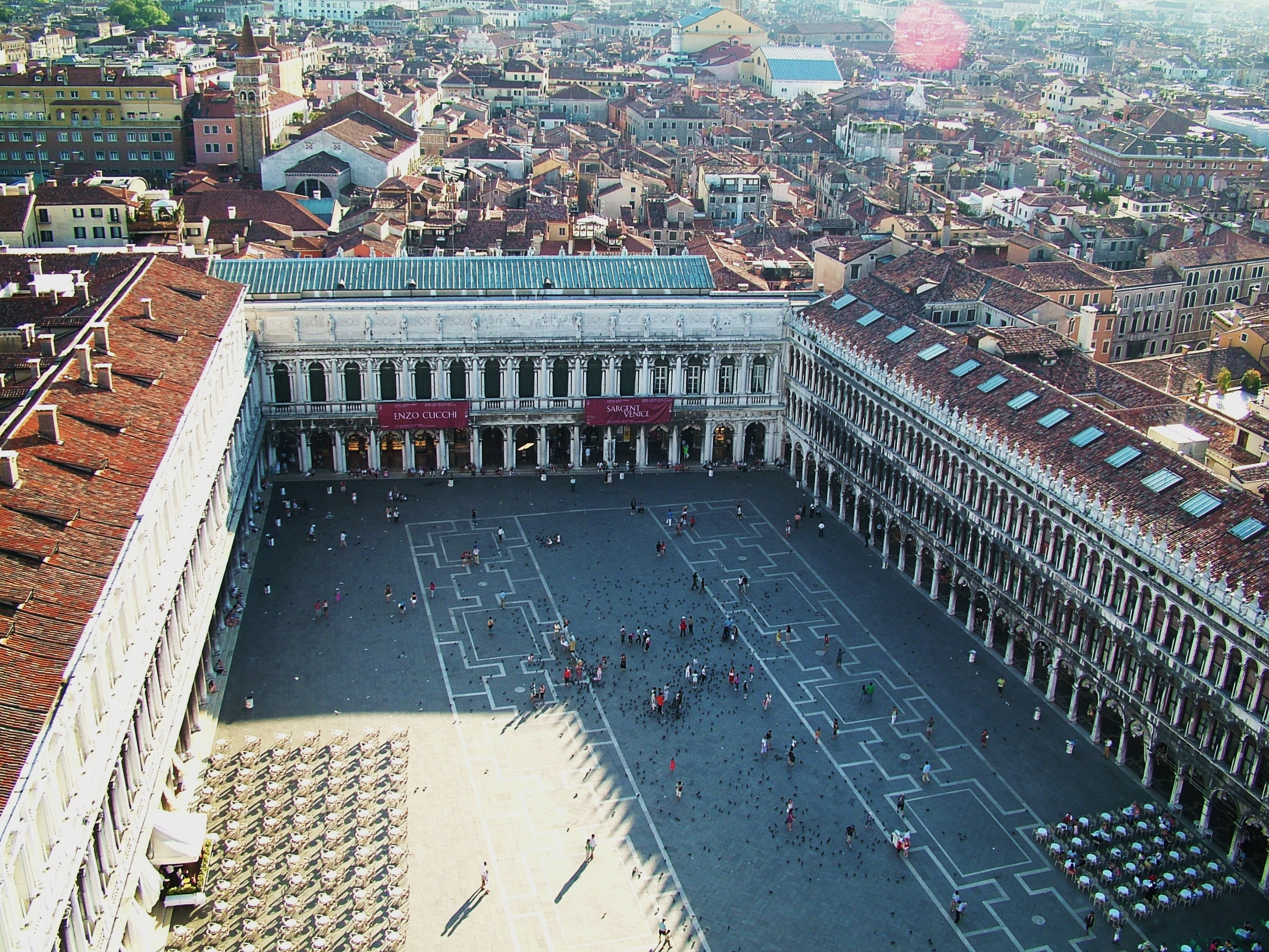 Cea mai cunoscuta piata din cel mai vizitat oras cu cea mai veche cafenea din lume 1723 the bricks were replaced with a more complex geometrical pavement design laid out by Venetian architect Andrea Tirali.